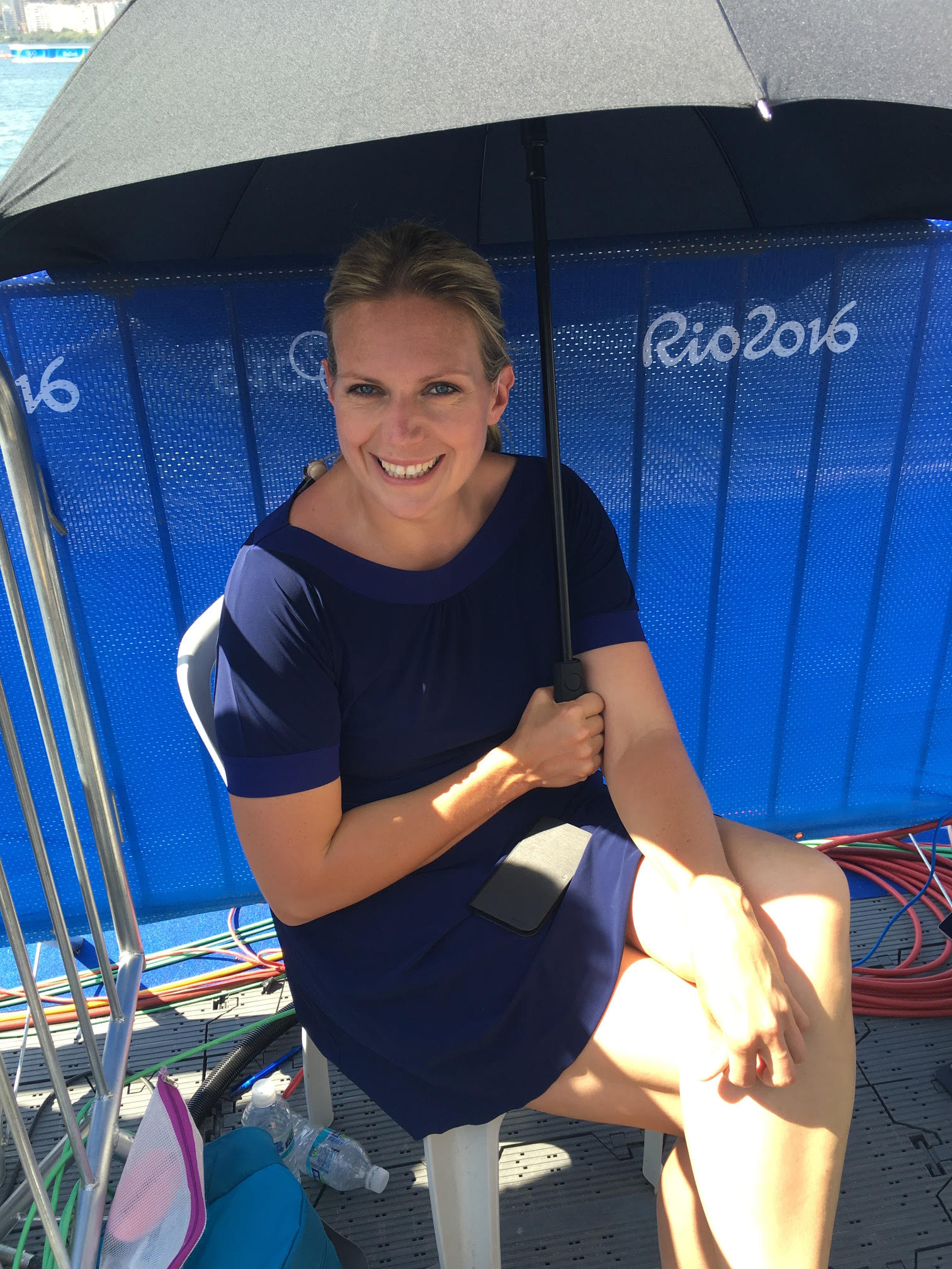 Alle Rechte bei Juliane Möcklinghoff. Brasilien, 2016.